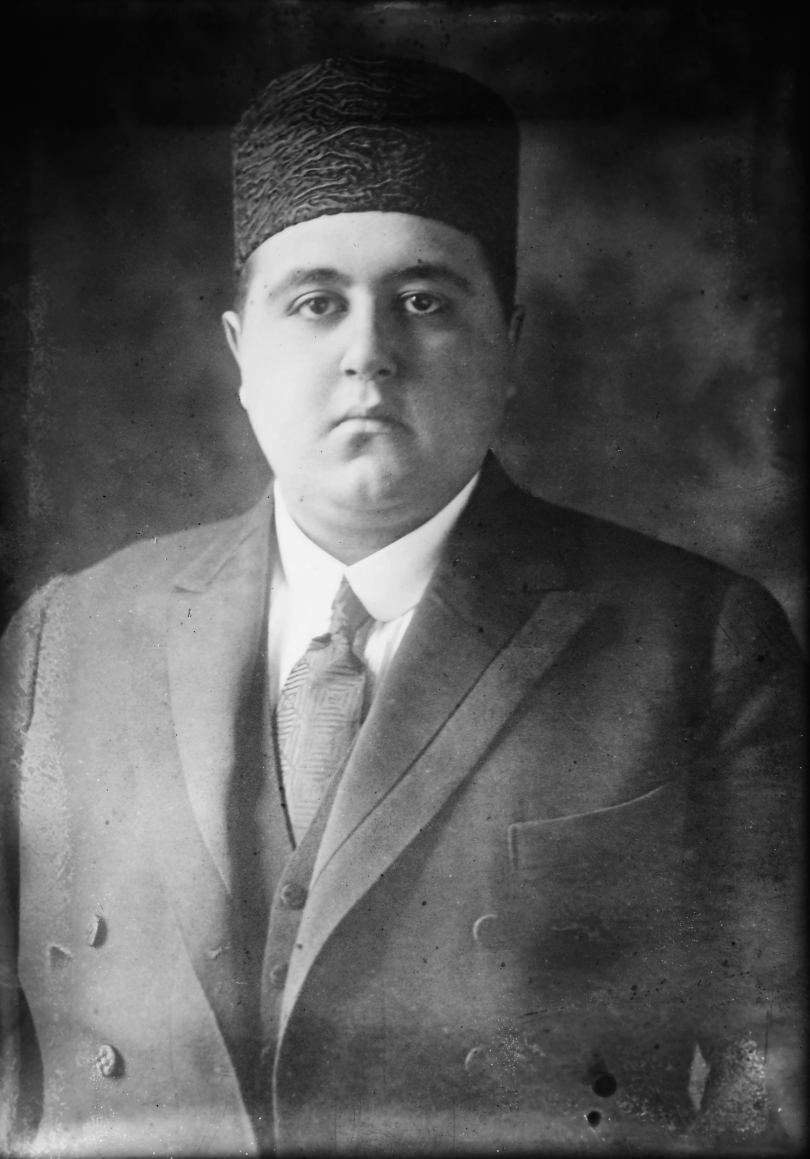 Ahmad Shāh Qājār, Shah of Iran, 1897-1929